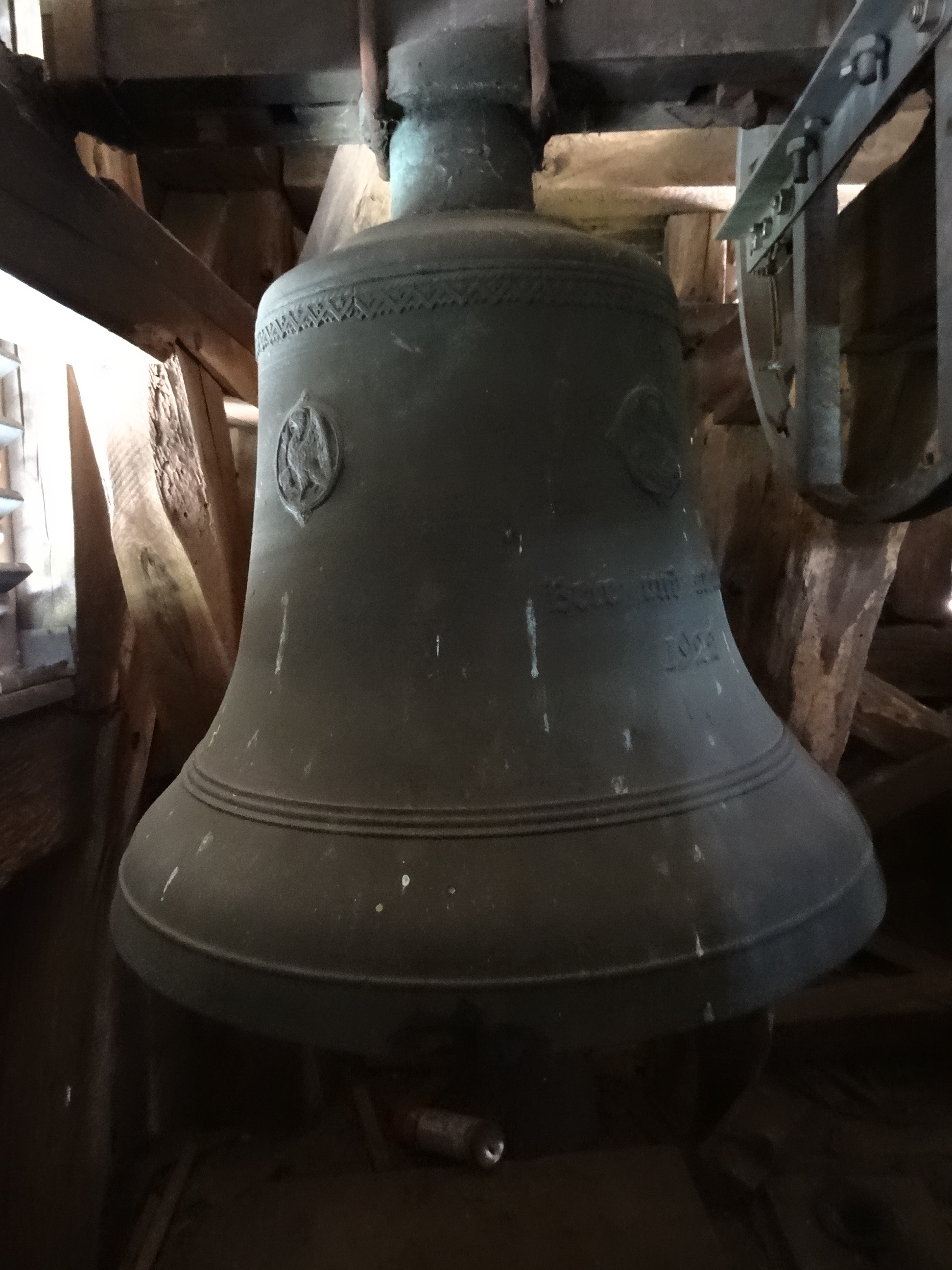 Evangelische Kirche (Ober-Bessingen)